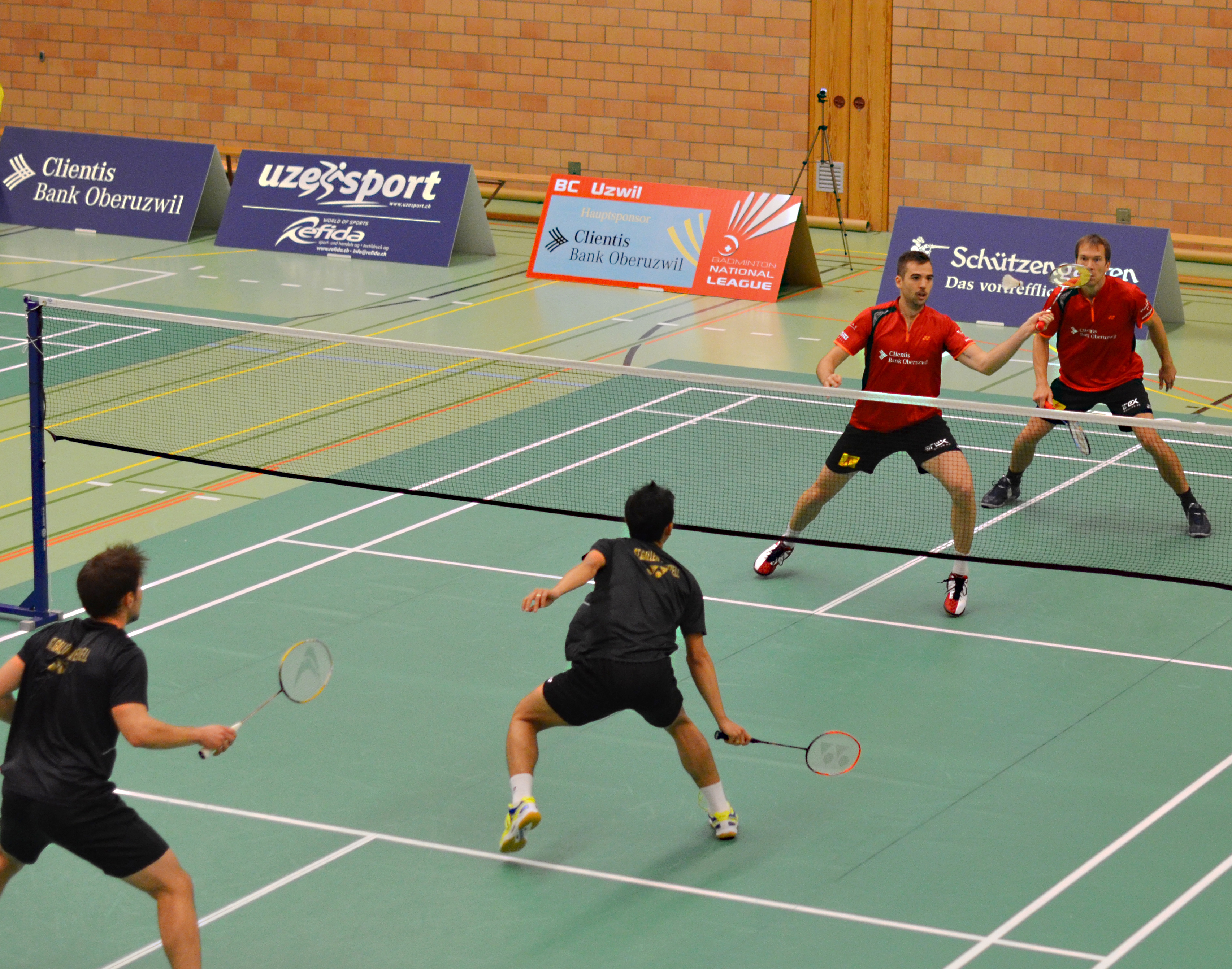 NLA Badminton Conrad Hückstädt